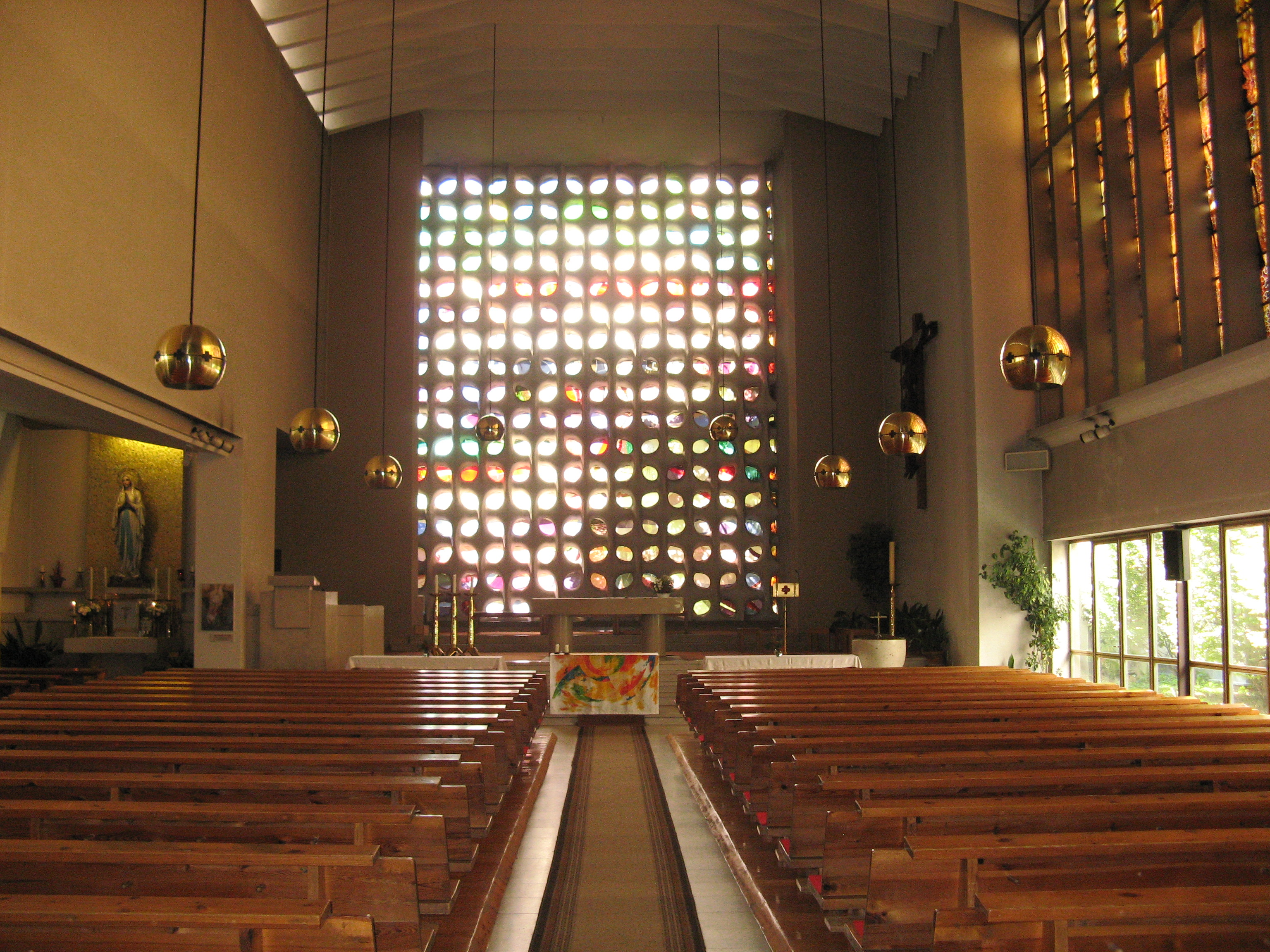 Innenraum der Kirche Maria Lourdes (1956-58) von Robert Kramreiter in Wien-Meidling